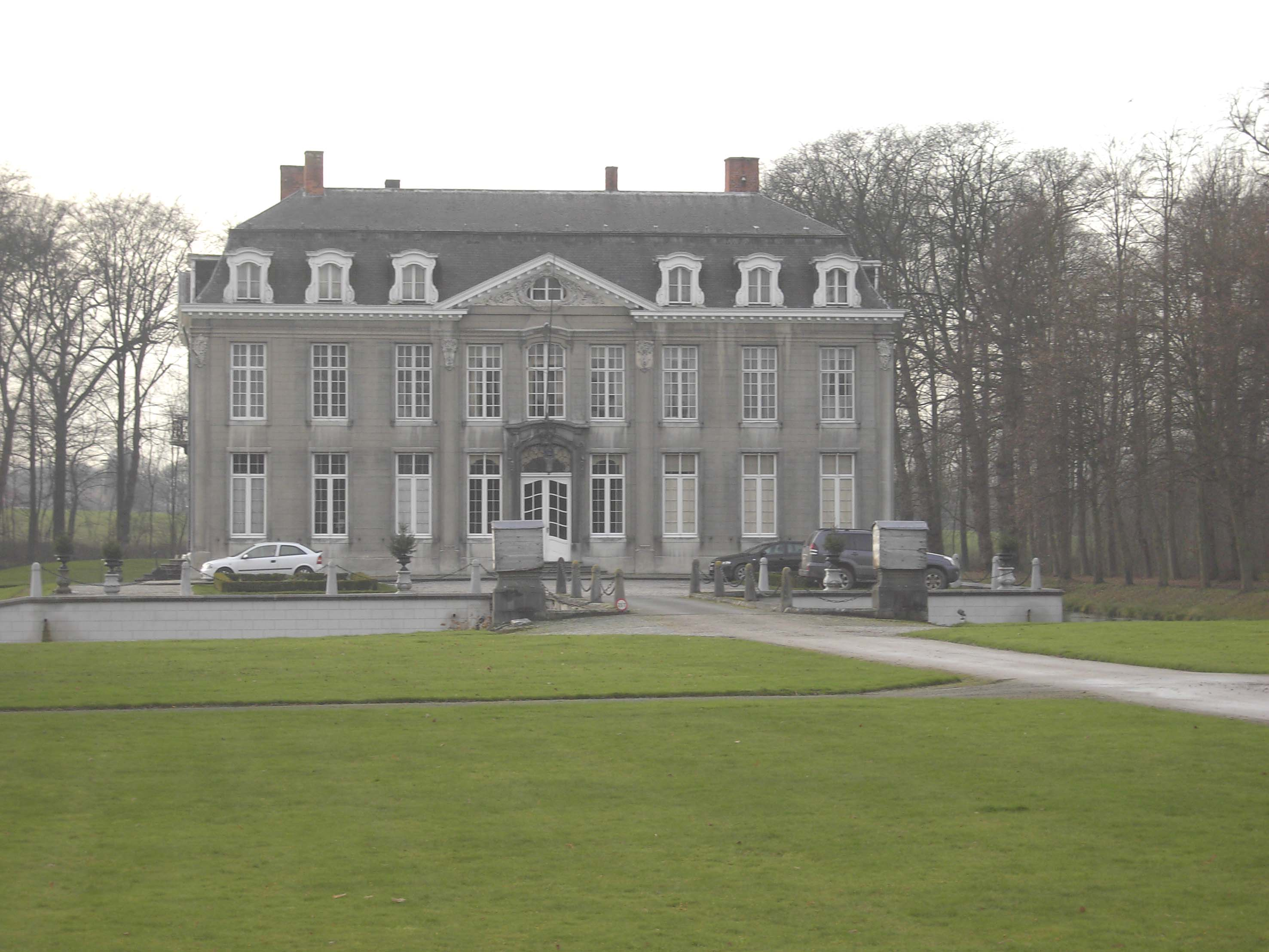 Kasteel van Leeuwergem, grondgebied Elene - Zottegem - Oost-Vlaanderen - Vlaanderen - België